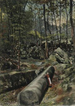 Die Riesensäule im hessischen Felsenmeer bei Reichenbach auf einer Postkarte aus dem Jahr 1904